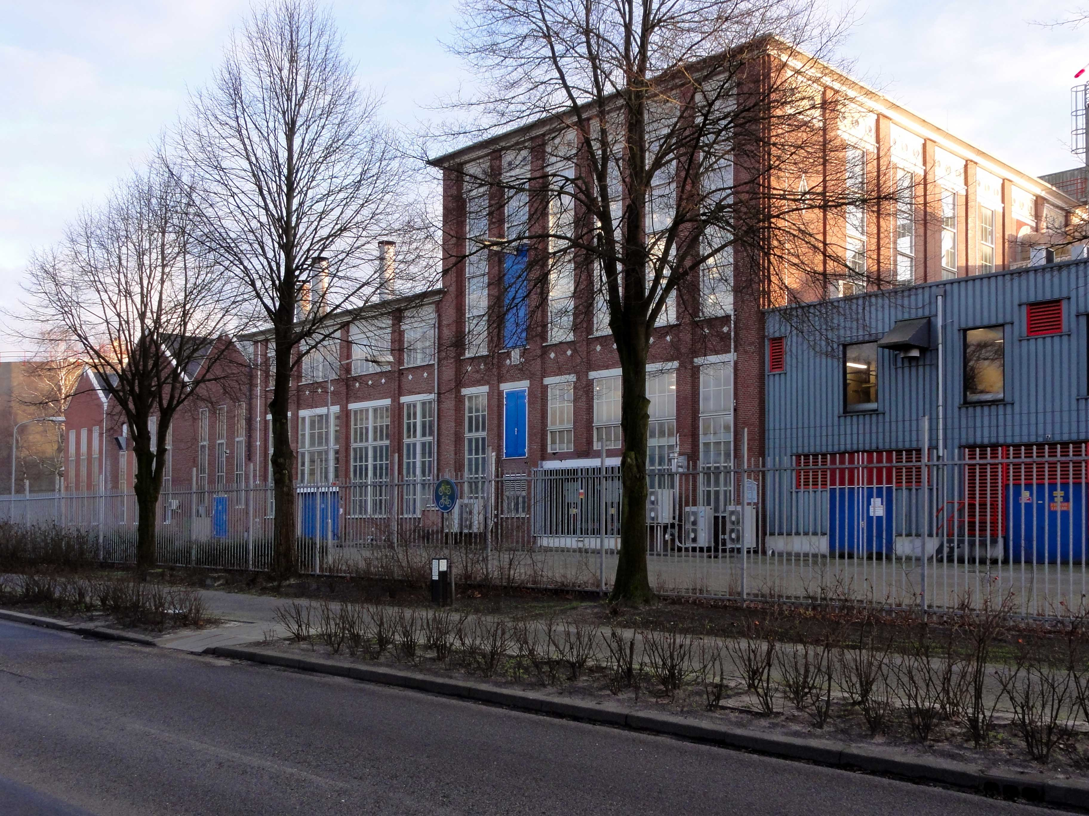 gebouwen aardappelmeelfabriek te Gasselternijveen, provinciaal monument